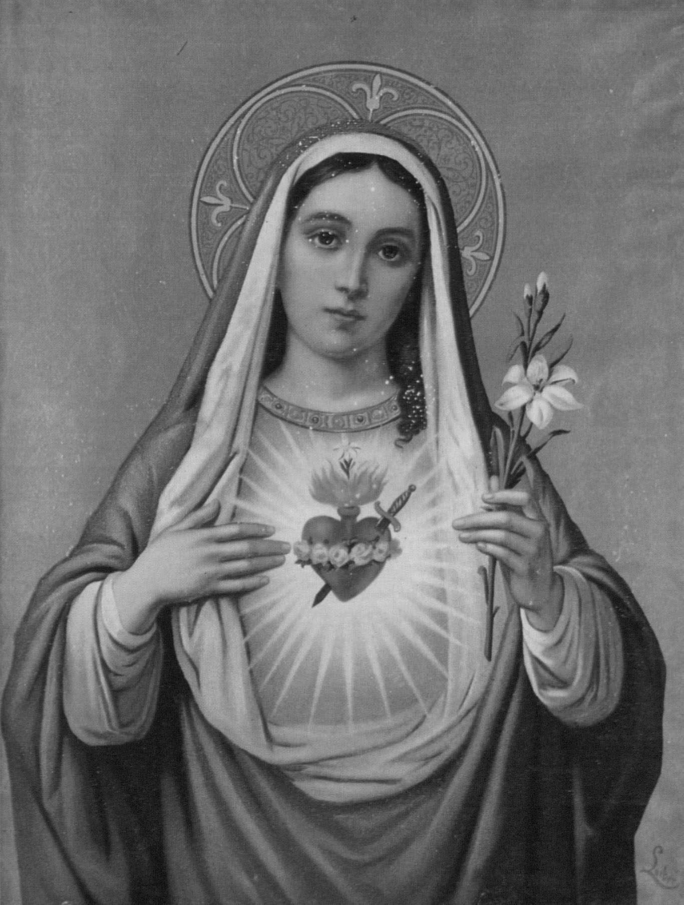 Herz Maria